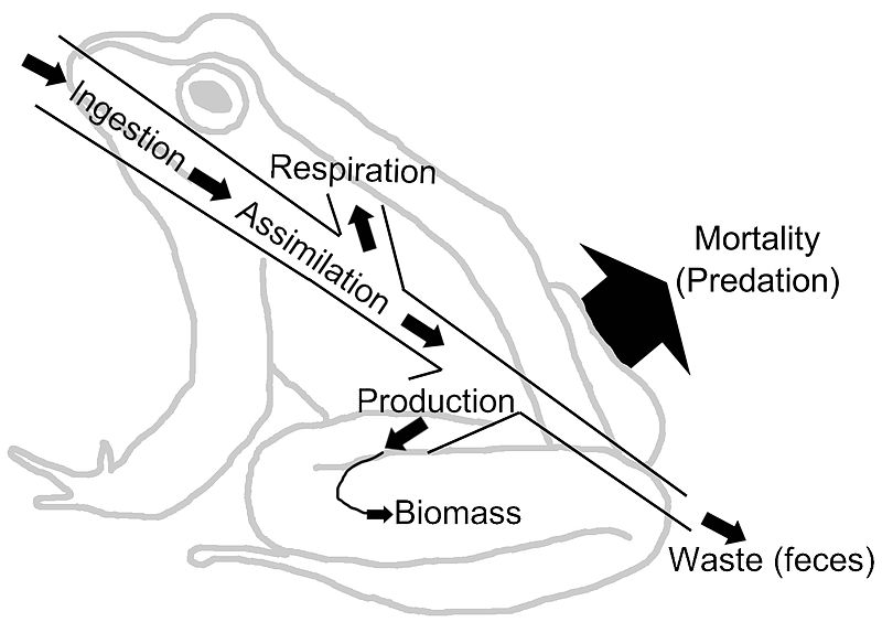 food web